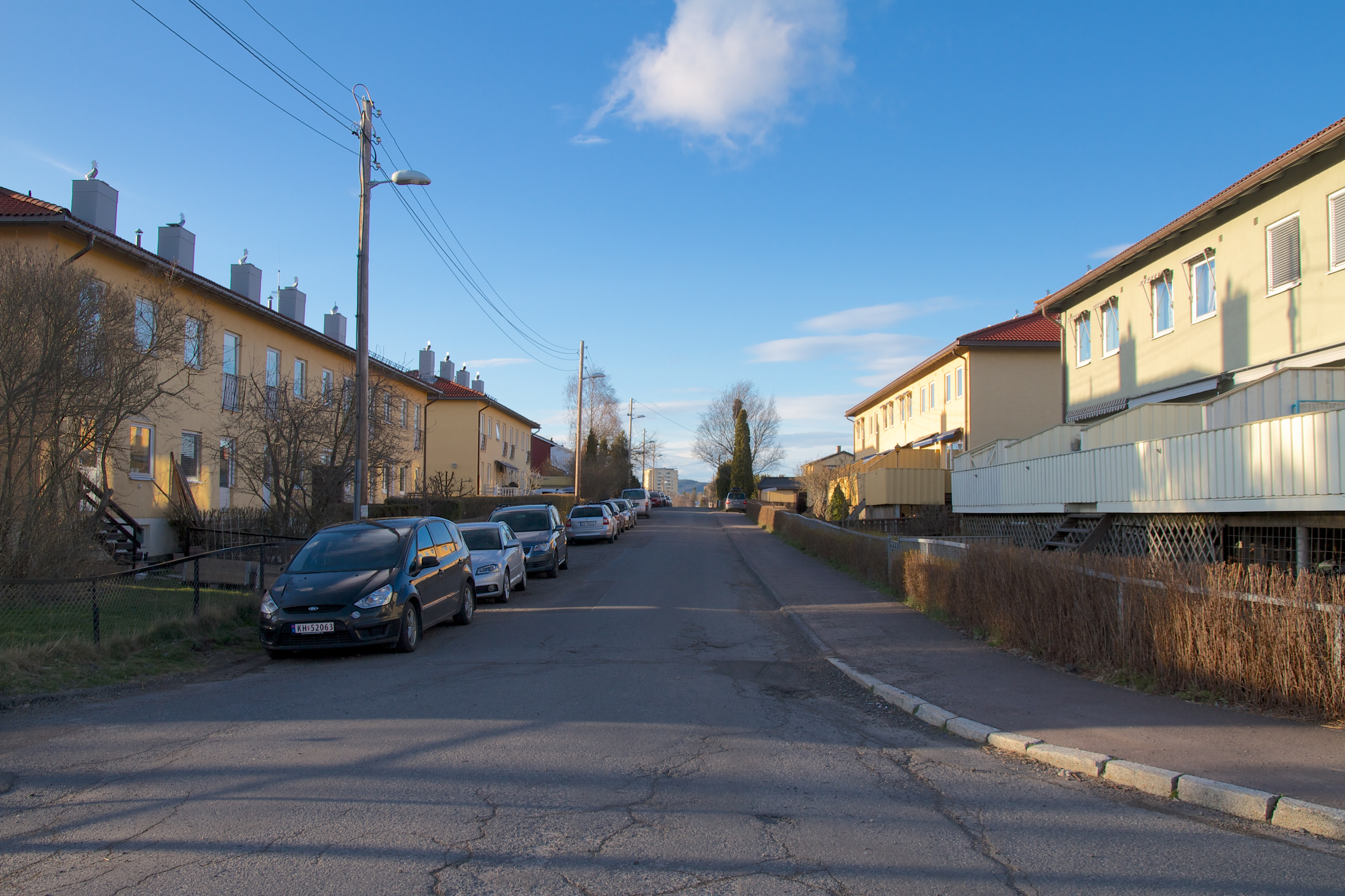 Bølerveien på Bøler i Oslo.